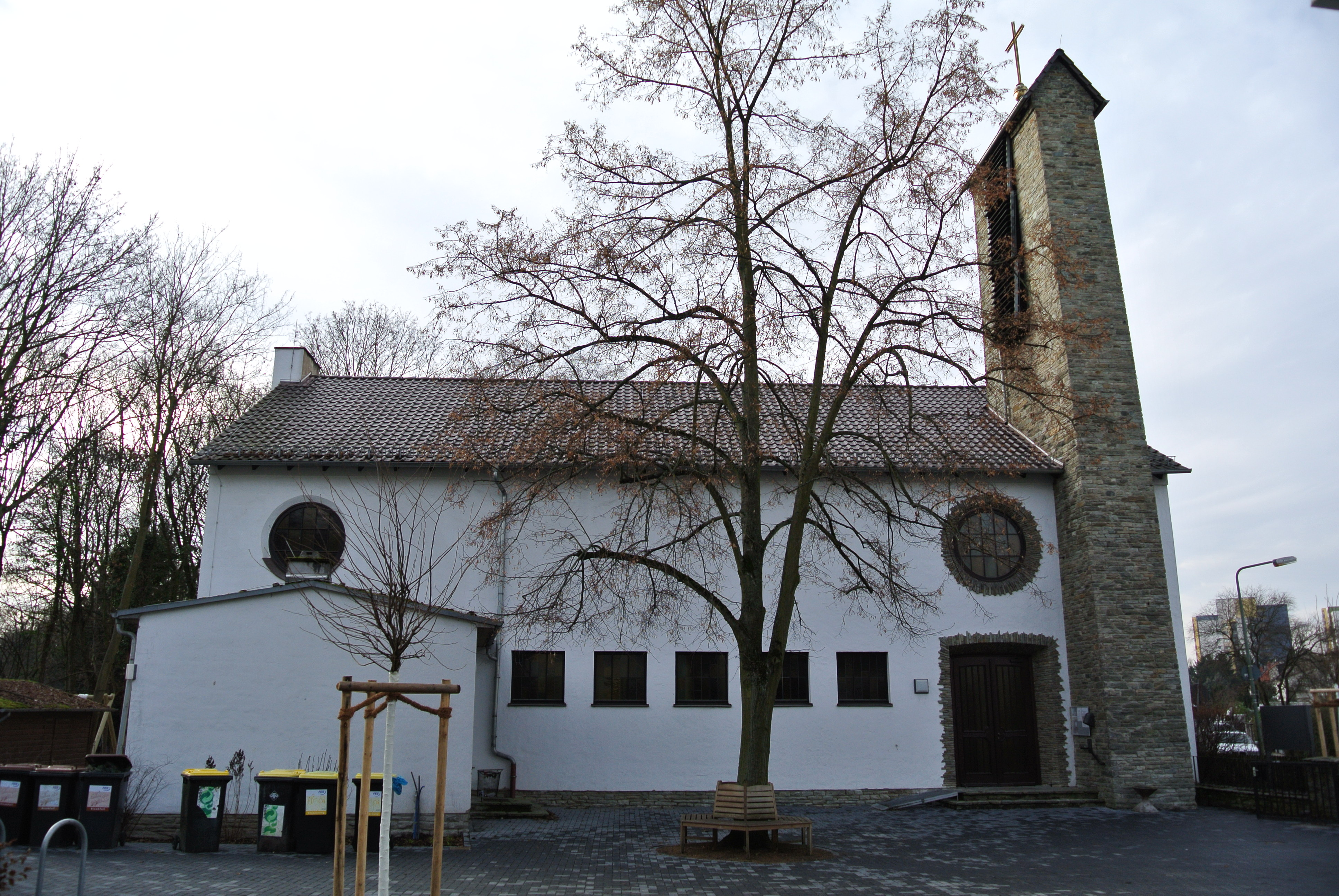 Evangelische Dankeskirche in Frankfurt-Goldstein, Am Goldsteinpark 1, Baujahr 1954, Architekt Ernst Görcke